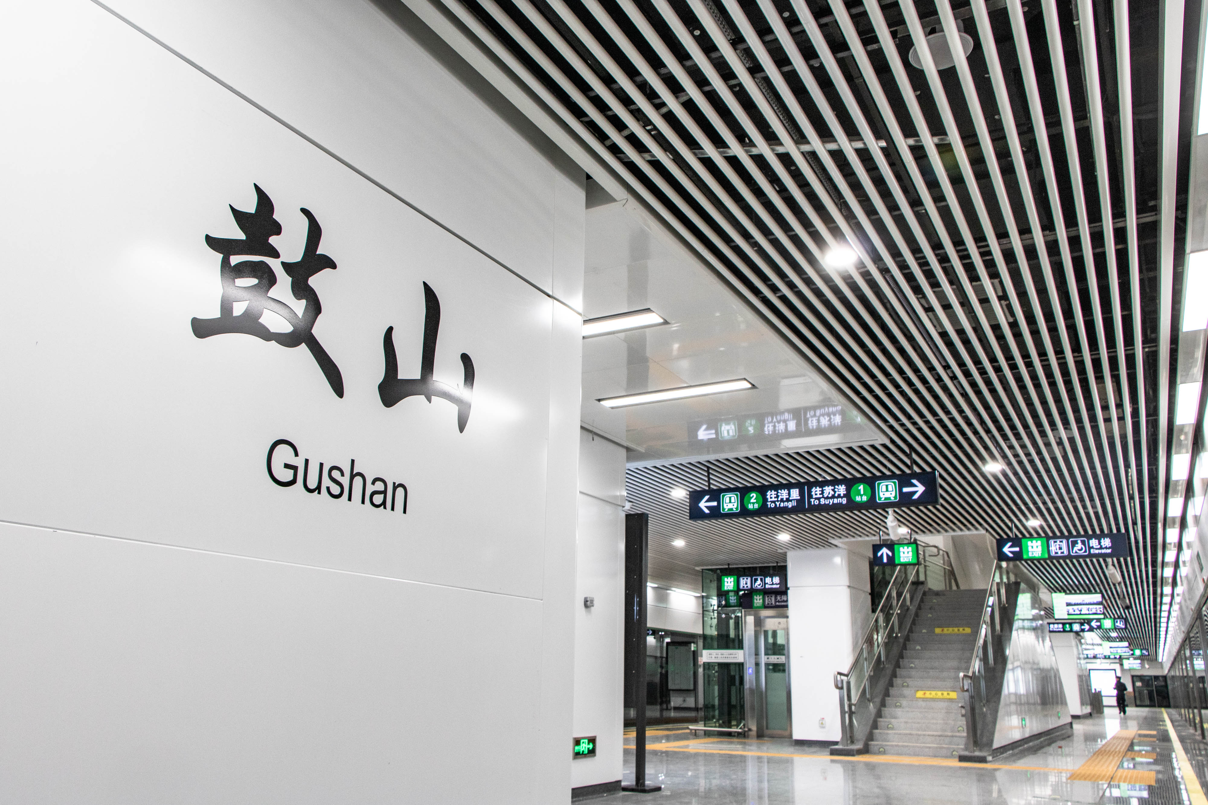 中文（中国大陆）: 福州地铁2号线鼓山站